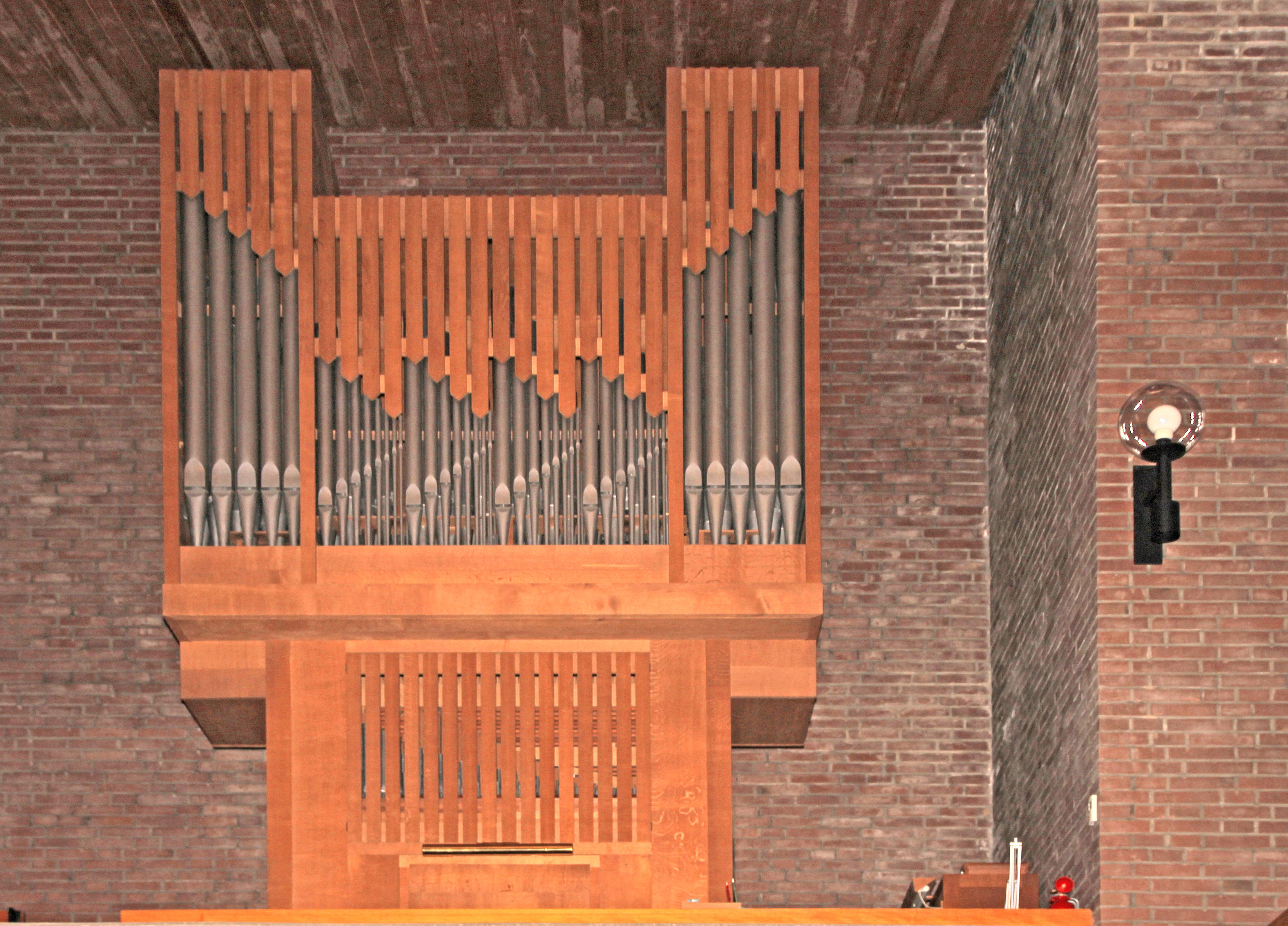 Orgel der Reformierten Kirche, Ferdinandstraße, Hamburg, Deutschland